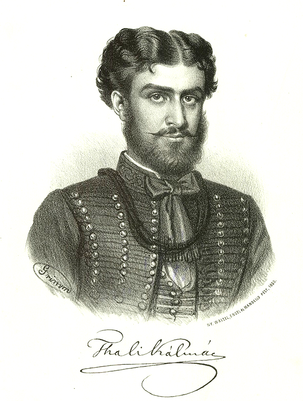 Thaly Kálmán, (Csép, 1839. január 3. – Zablát, 1909. szeptember 26.) költő, író, tiszteletbeli bölcsészdoktor, a Magyar Tudományos Akadémia tiszteleti tagja, országgyűlési képviselő. Jókai Mór másodunokatestvére.